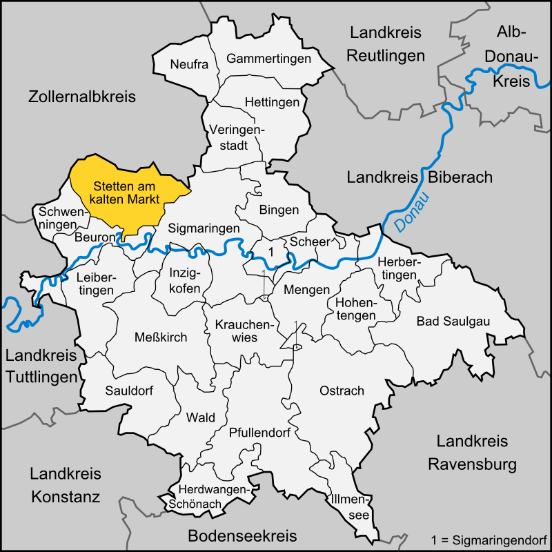 Karte der Gemeinde Stetten am kalten Markt im Landkreis Sigmaringen